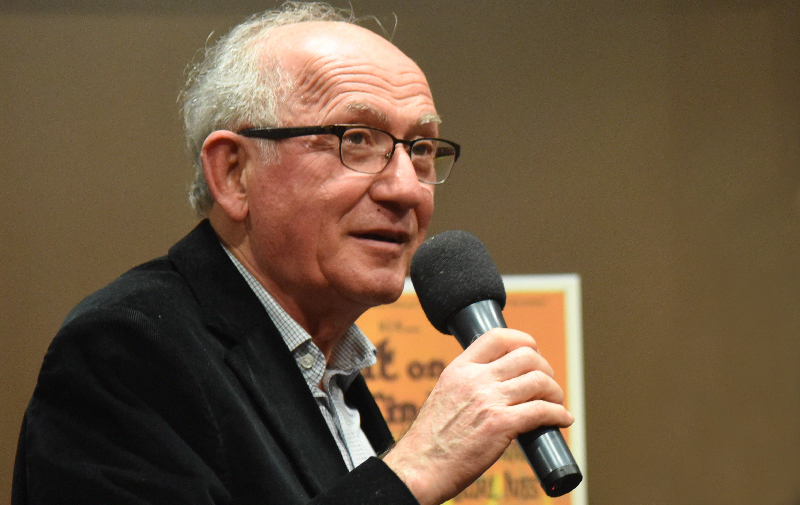 charles FITERMAN en mars 2015 lors d'une rencontre avec de jeunes collégiens du Chambon Feugerolles